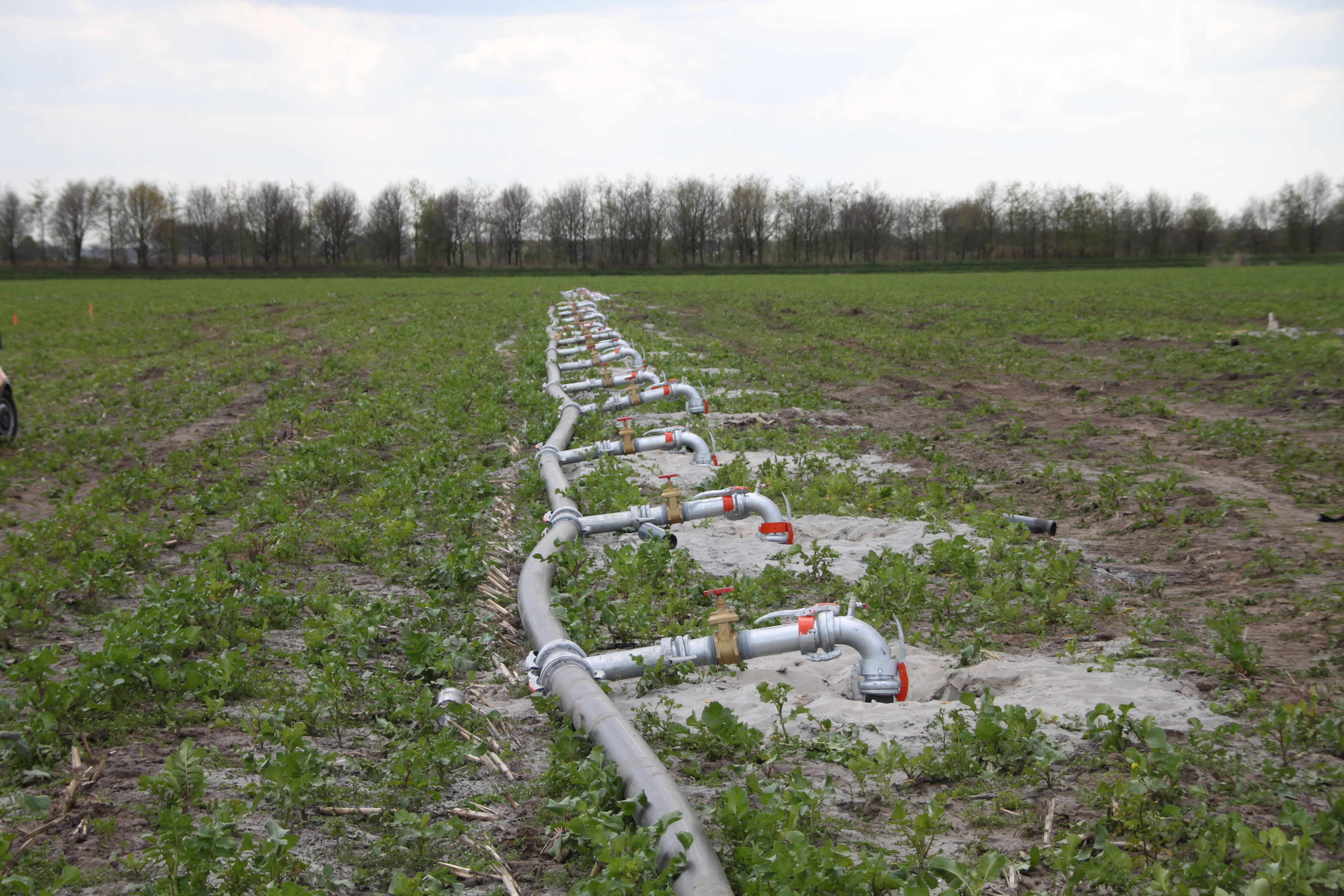 DSI-Retourbemaling. (DSI=Düsensauginfiltration)